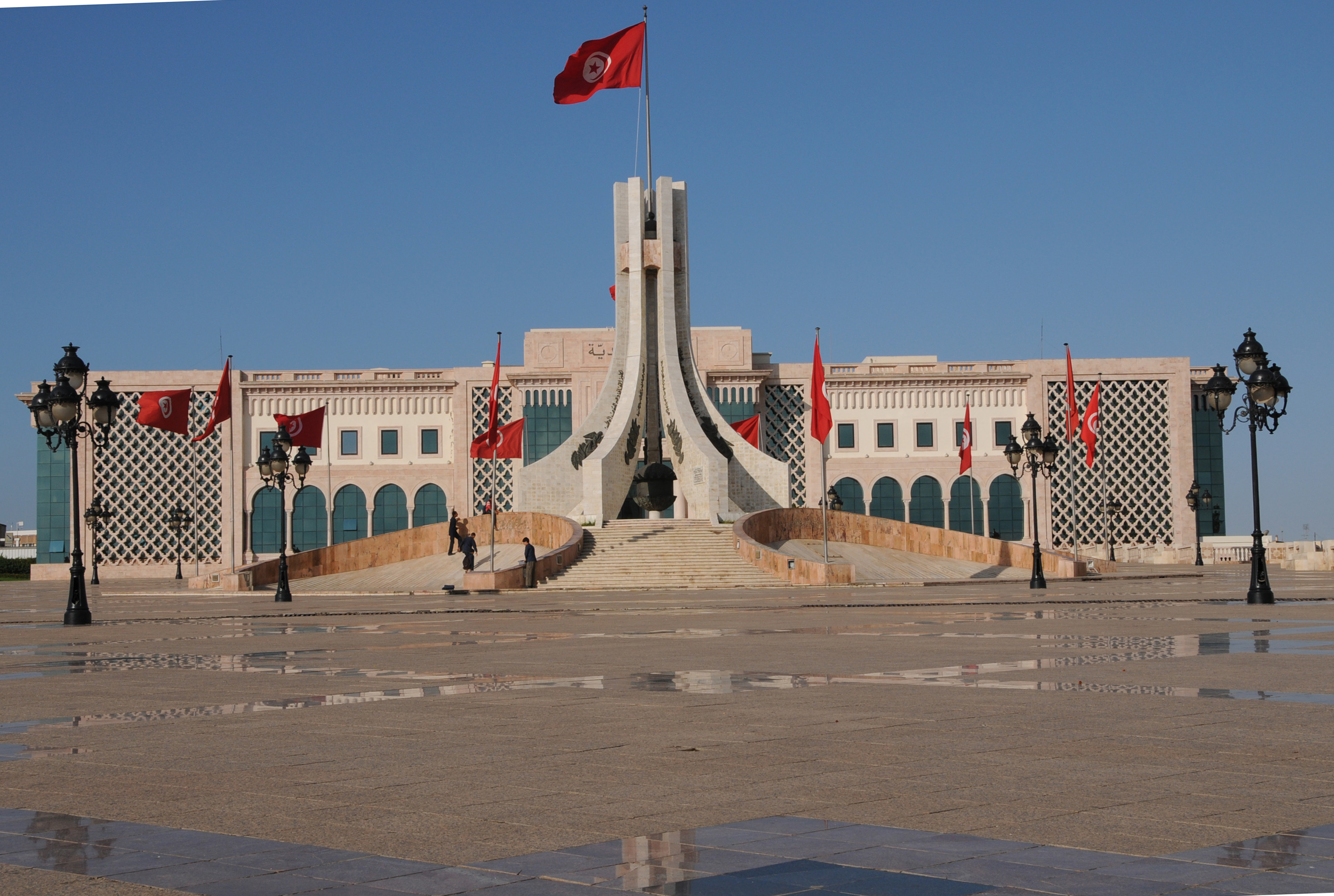 Hotel de Ville de Tunis sur la place de la Kasbah